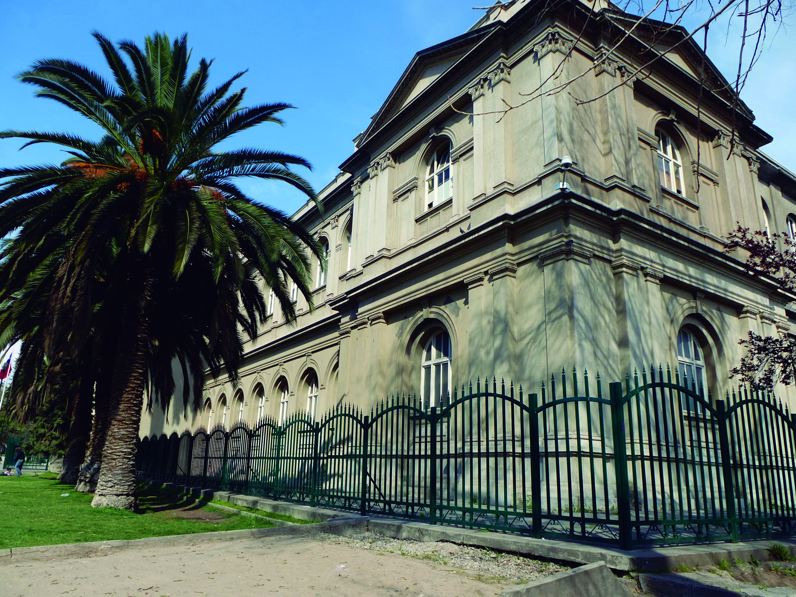 Museo Nacional de Historia Natural This is a photo of a national monument in Chile: 879